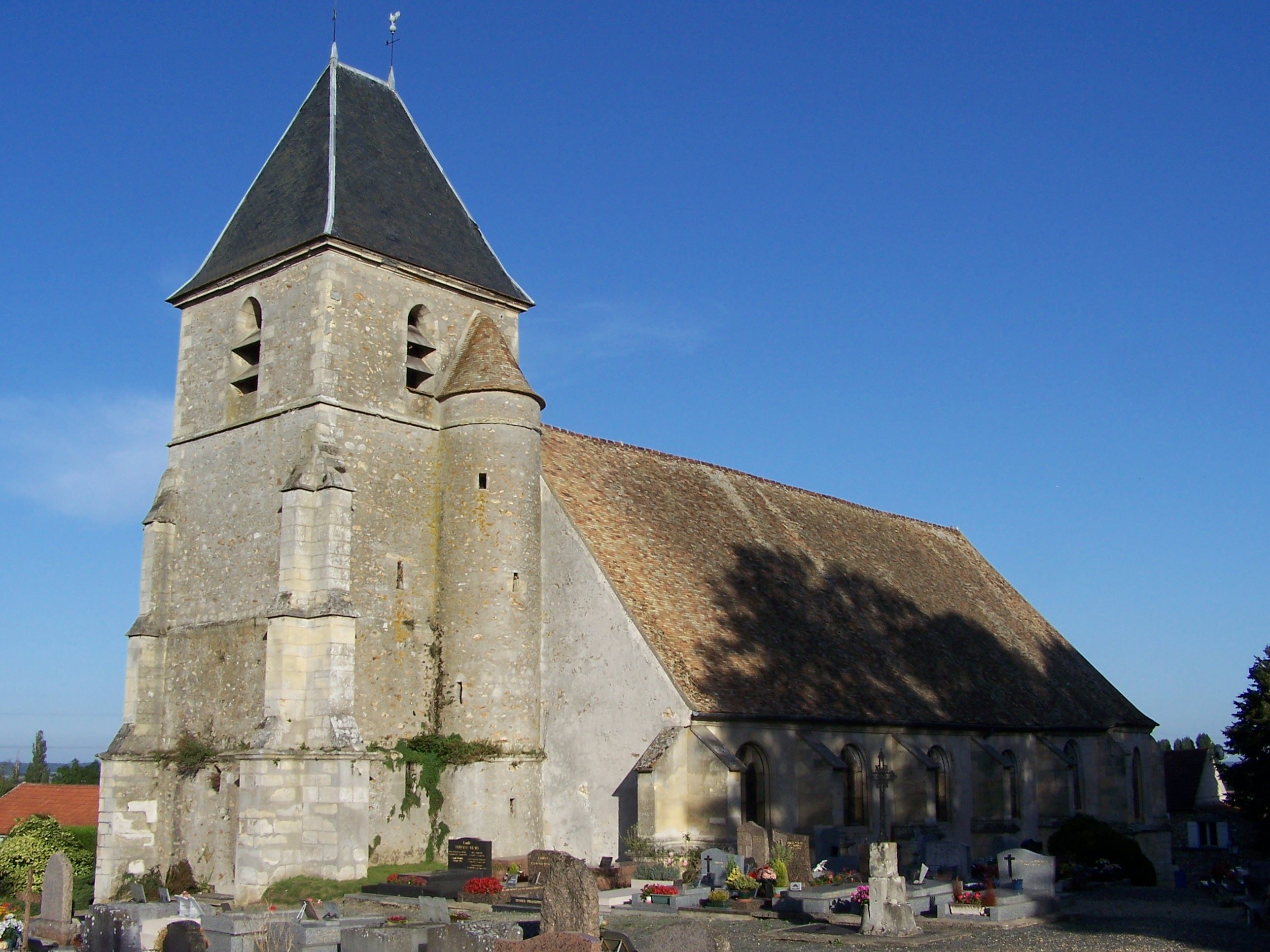 Église de Marcq (Yvelines, France)